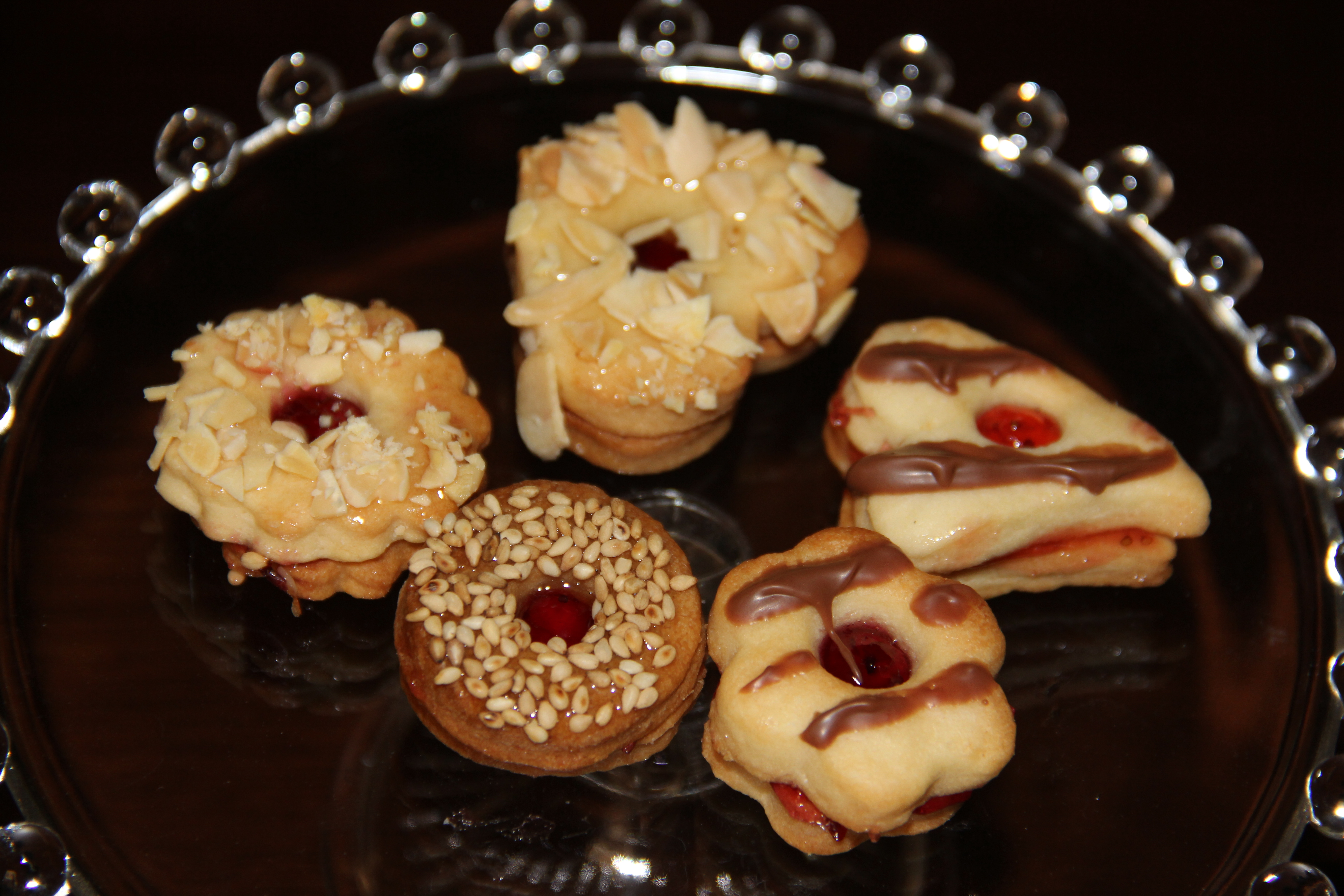 Shirini mashhadi شیرینی مشهدی